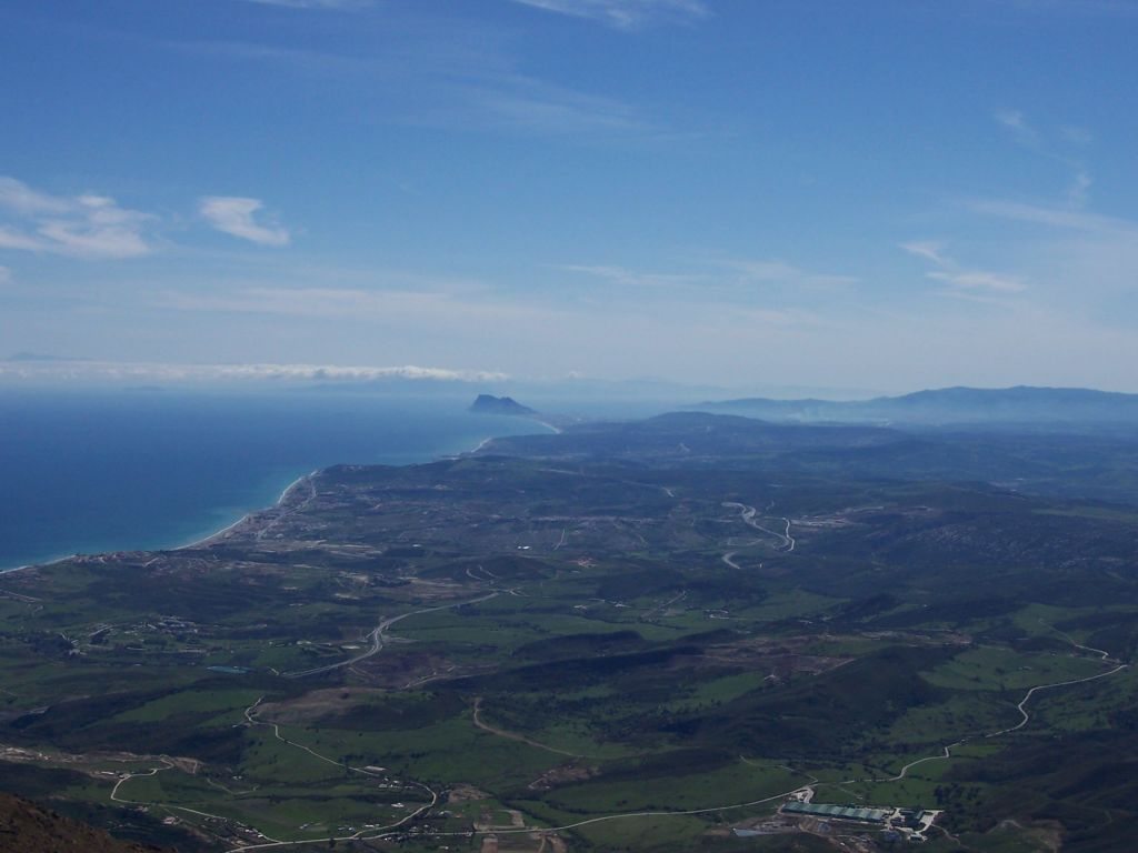 Foto mía de estepona (dominio público)